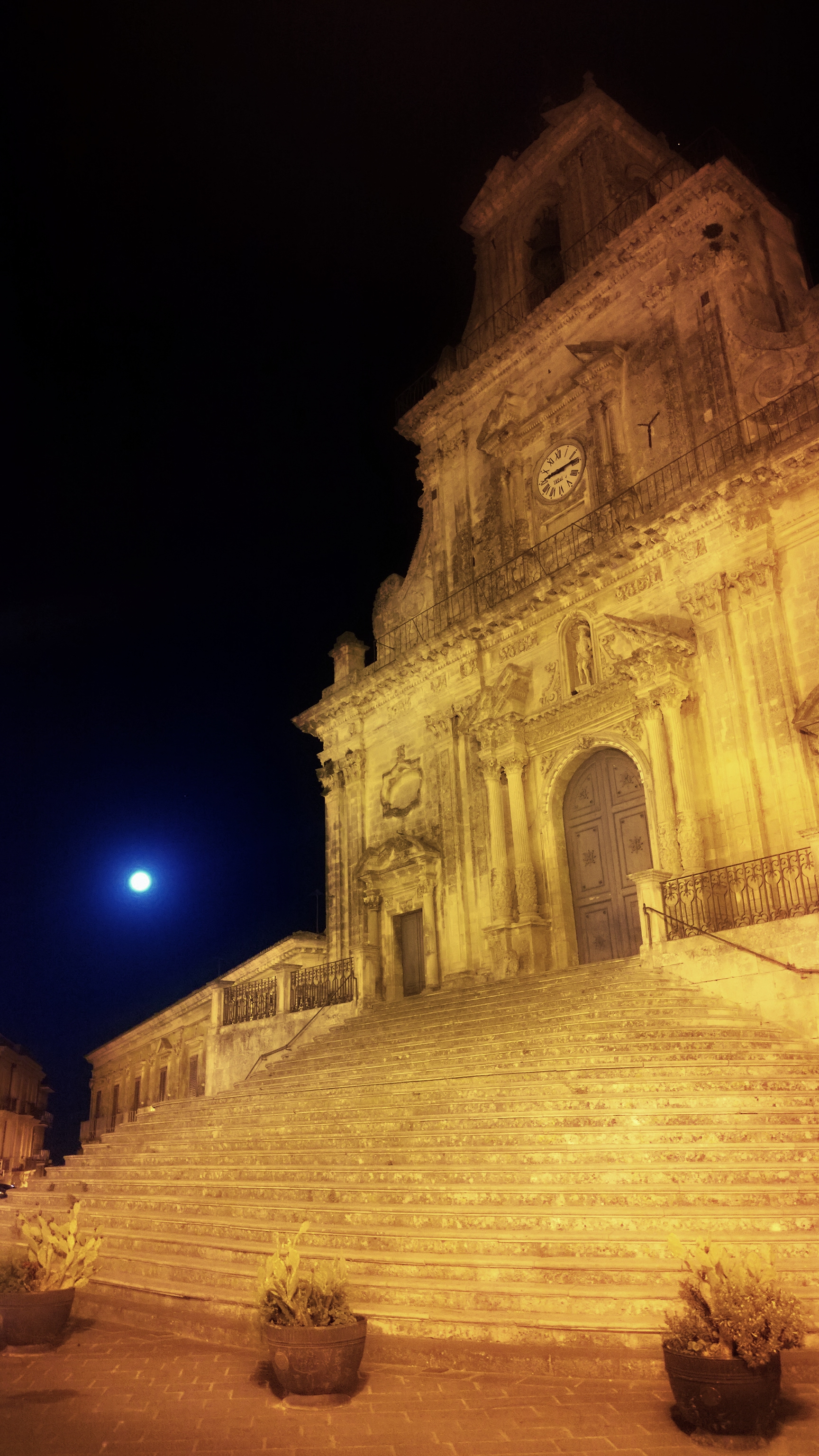 La luna a Palazzolo